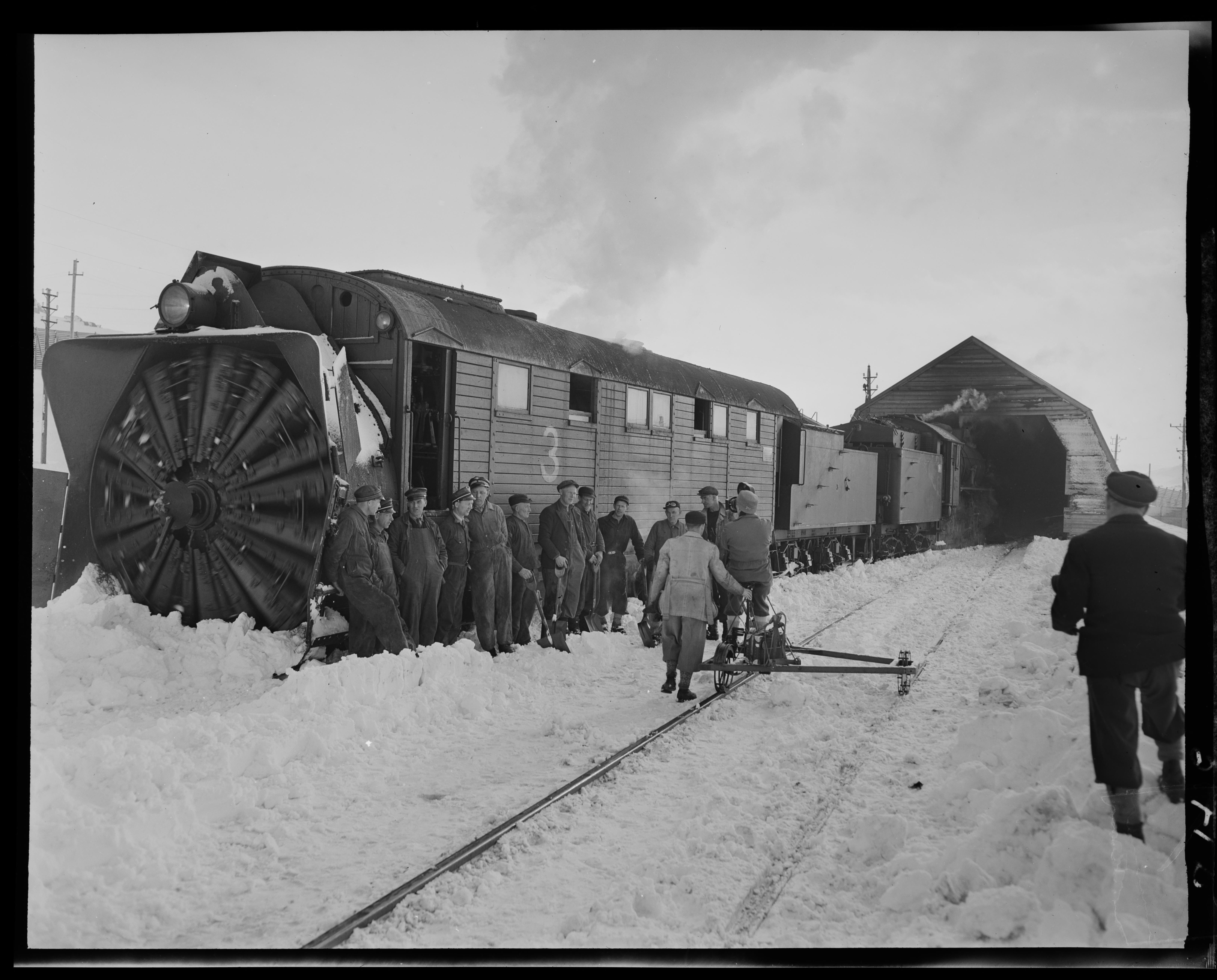 Bildet er hentet fra Nasjonalbibliotekets bildesamling. Anmerkninger til bildet var: fotograf :ukjent Finse, Ulvik, Hordaland